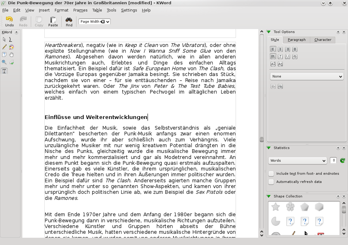 Bild des freien Textverarbeitungsprogramms KWord